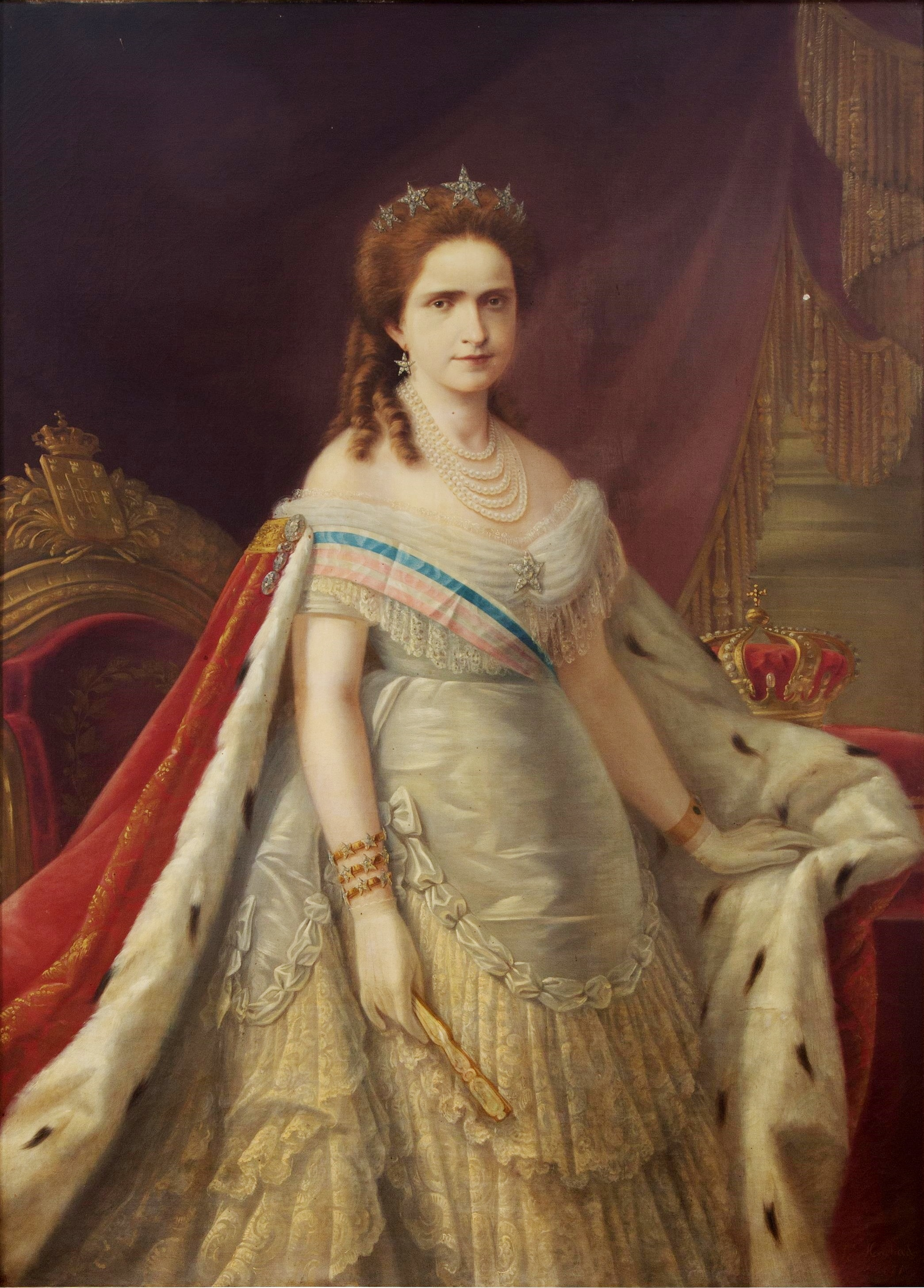 Retrato de la reina María Pía de Saboya (1847-1911), que fue hija del rey Víctor Manuel II de Italia y reina consorte de Portugal por su matrimonio con el rey Luis I de Portugal.